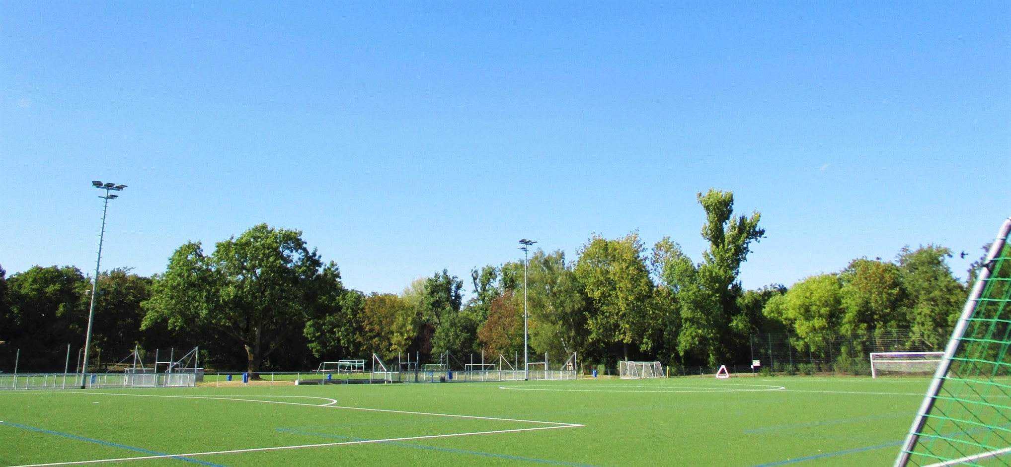 Sportplatz in Praunheim - nach der Sanierung, mit Kunstrasen